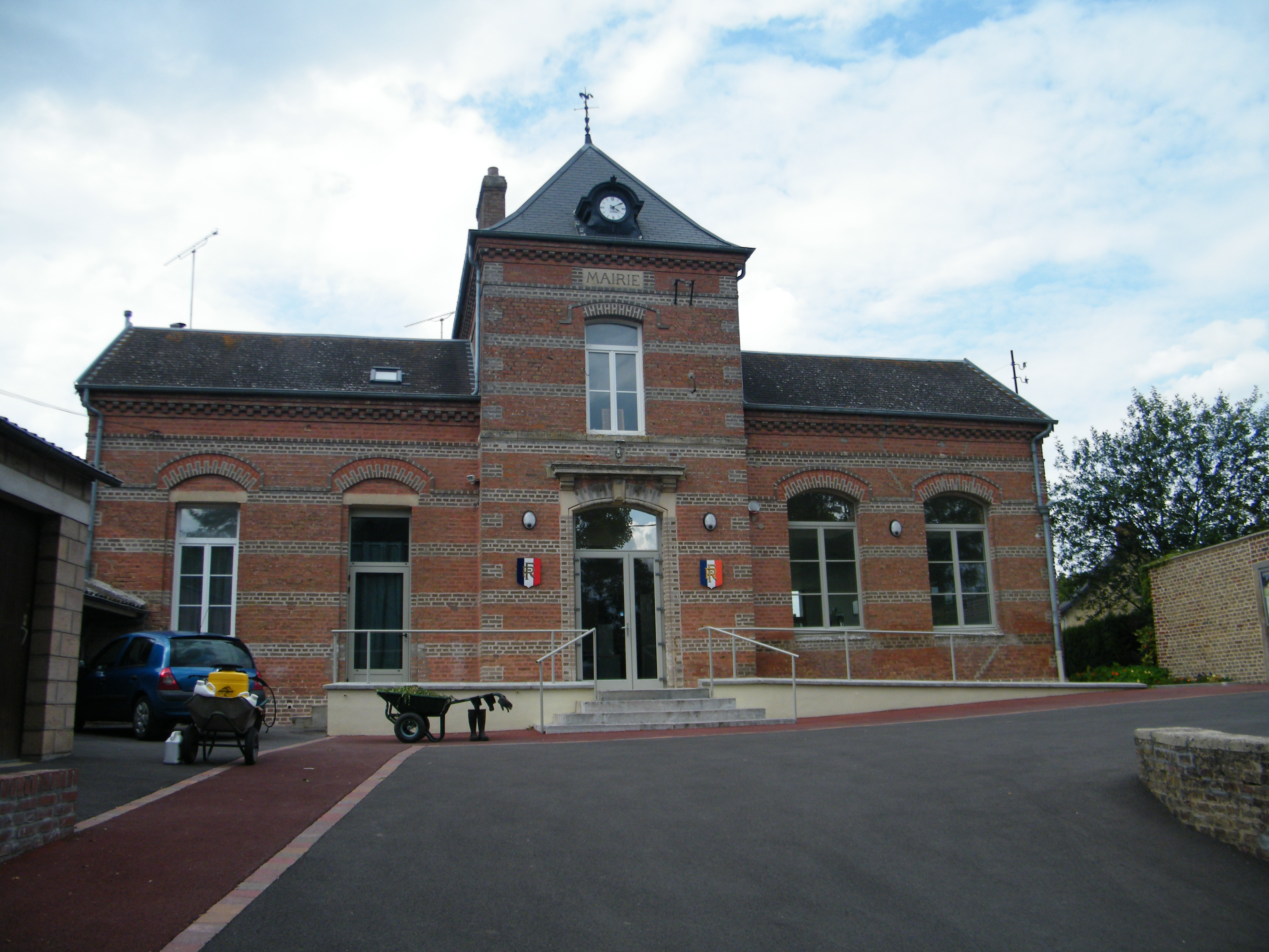 Mairie-école.